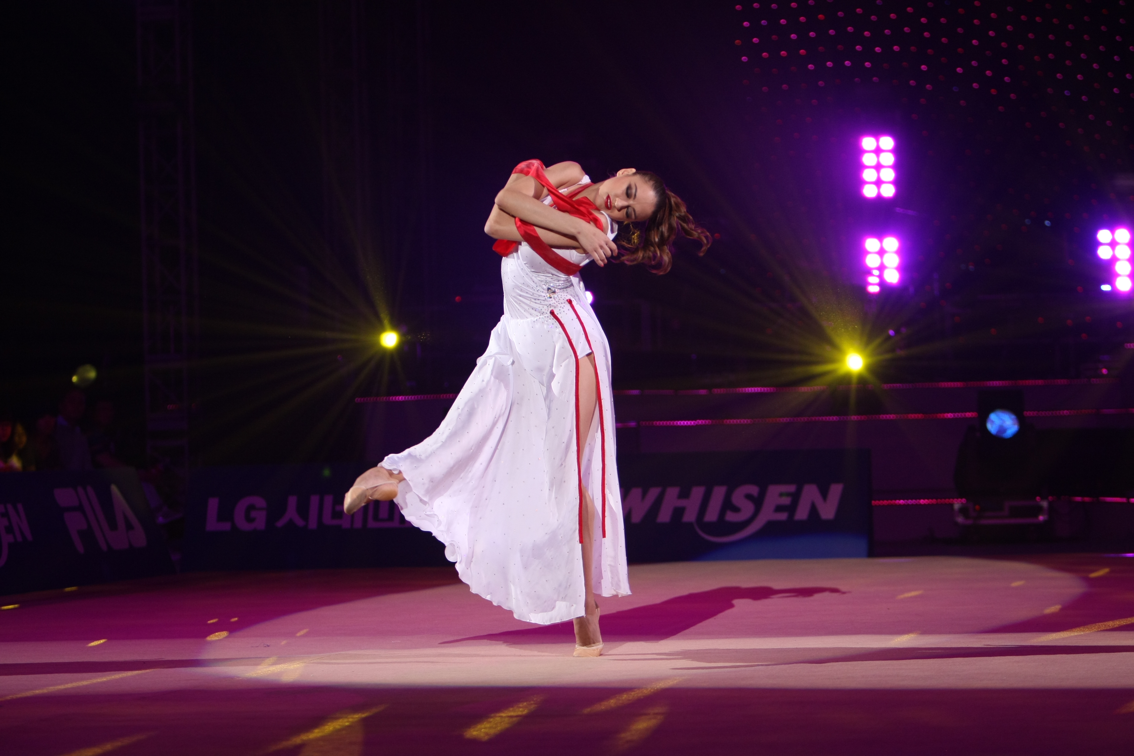 LG전자가 11일(土, 오후 3시), 12일(日, 오후 2시) 양일간 고려대학교 화정체육관 특설무대에서 국내 최초 리듬체조 갈라쇼인 ‘LG WHISEN Rhythmic All Stars 2011’ 행사를 개최했다. 사진은 11일 고려대학교 화정체육관 특설무대에서 열린 ‘LG WHISEN Rhythmic All Stars 2011’ 행사에서 LG ‘휘센’ 광고모델인 손연재(18세, 세종고) 선수를 비롯해 국내외 전•현역 리듬체조 스타들이 총출동해 멋진 리듬체조를 보여줬다.